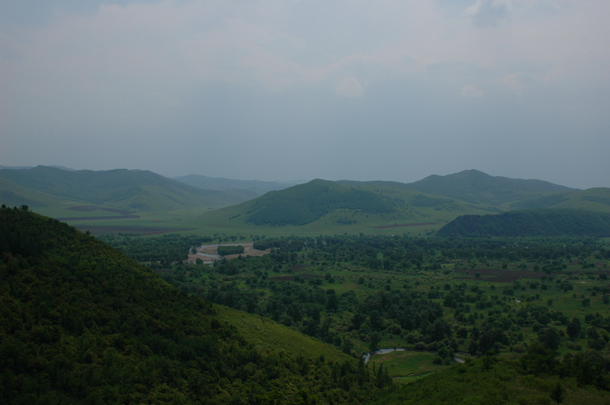 Mingshuizhen, Horqin Front